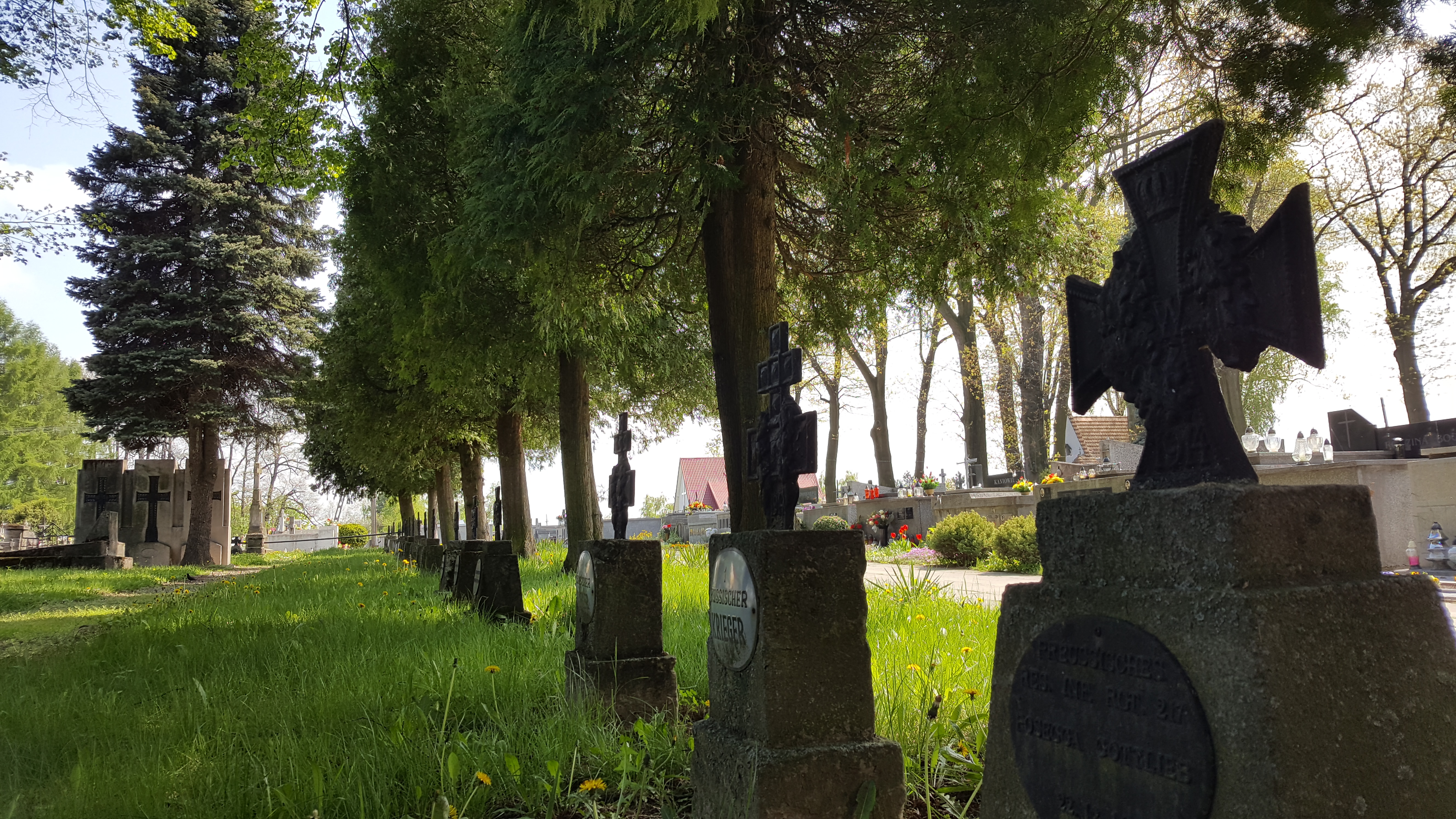 Cmentarz wojenny nr 215 w Wierzchosławicach z okresu I wojny światowej.